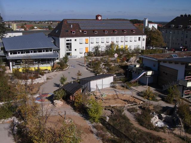 SFZ Schwabach mit Blick auf den Pausenhof